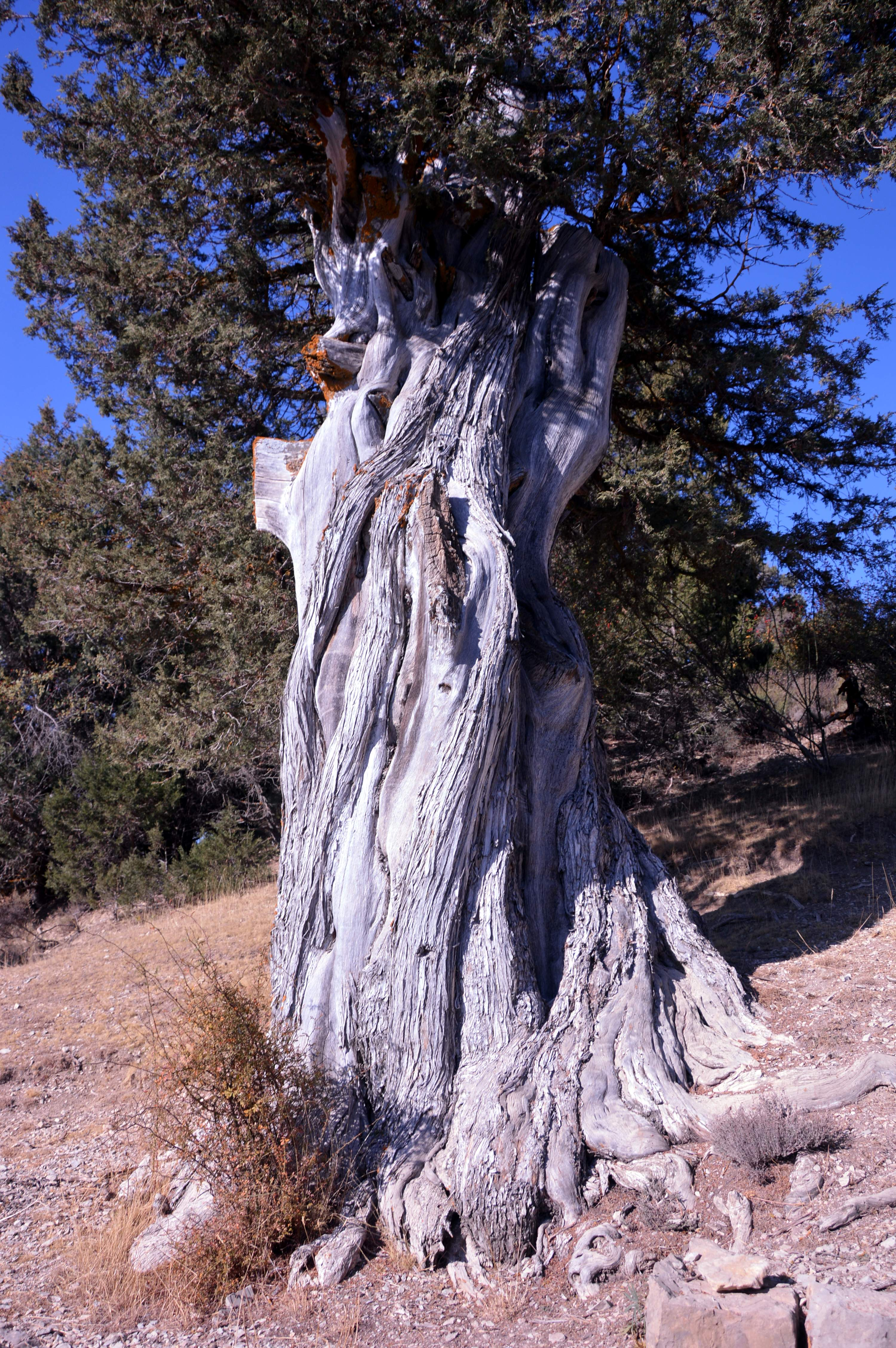 Ejemplar de sabina en el Sabinar de las Blancas del Parque Natural de Puebla de San Miguel (Valencia), 2017.